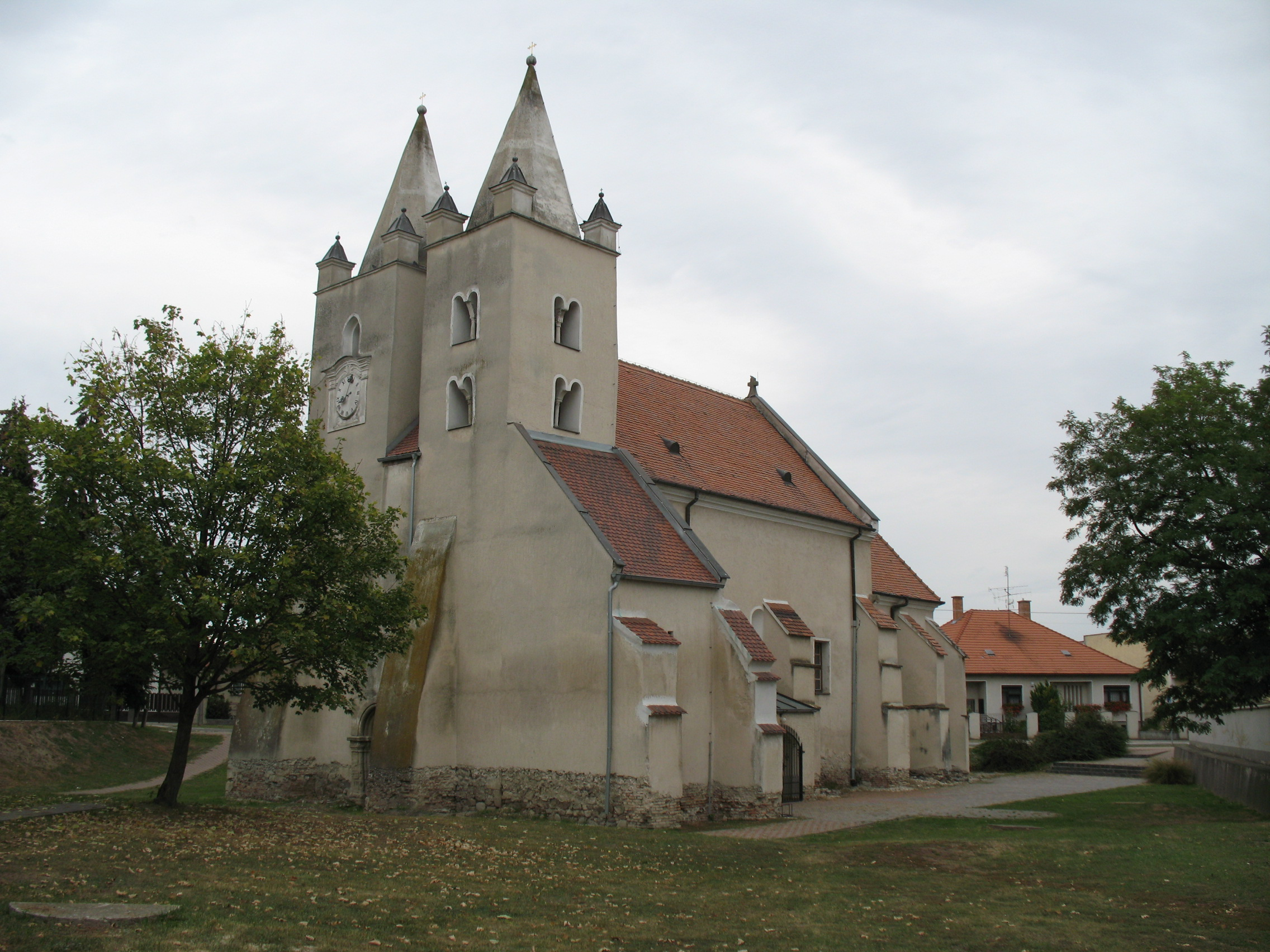 Csütörtök templom